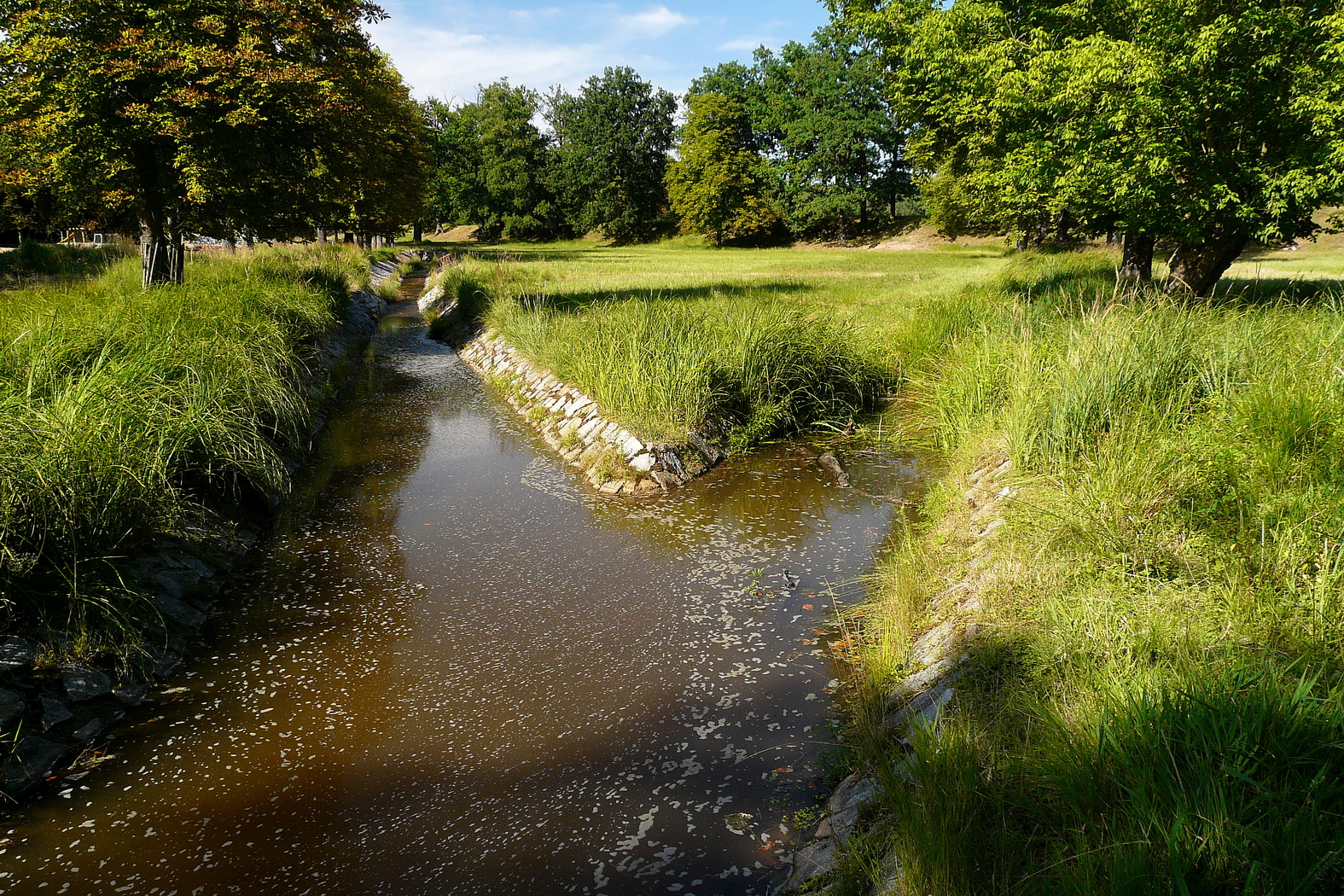 Jabkenický potok - soutok odtoku s přepadem z rybníka Vidlák